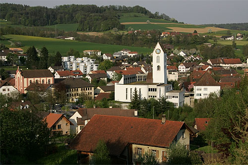 Lengnau: Synagoge und Kirche St.Martin